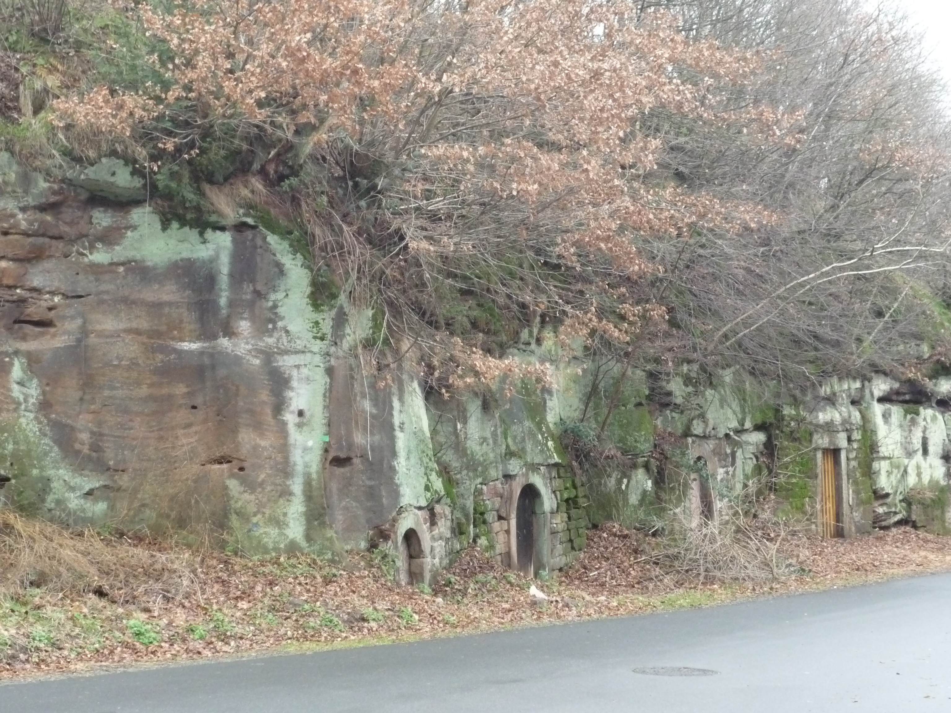 Felsenkeller in Niederauerbach (Zweibrücken, Rheinland-Pfalz, Deutschland)